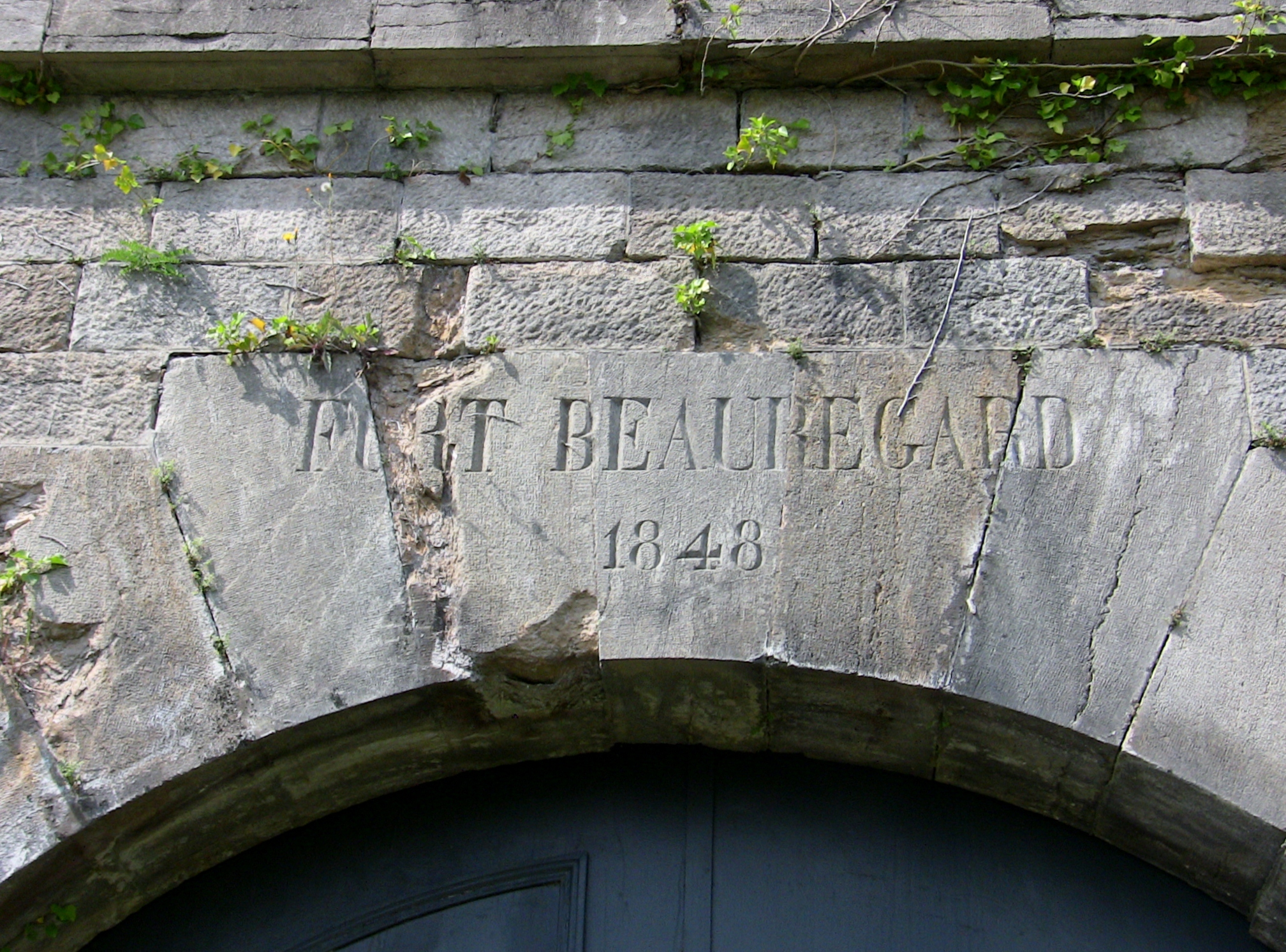 Détail de la porte charretière du fort de Beauregard à Besançon (Doubs, France).